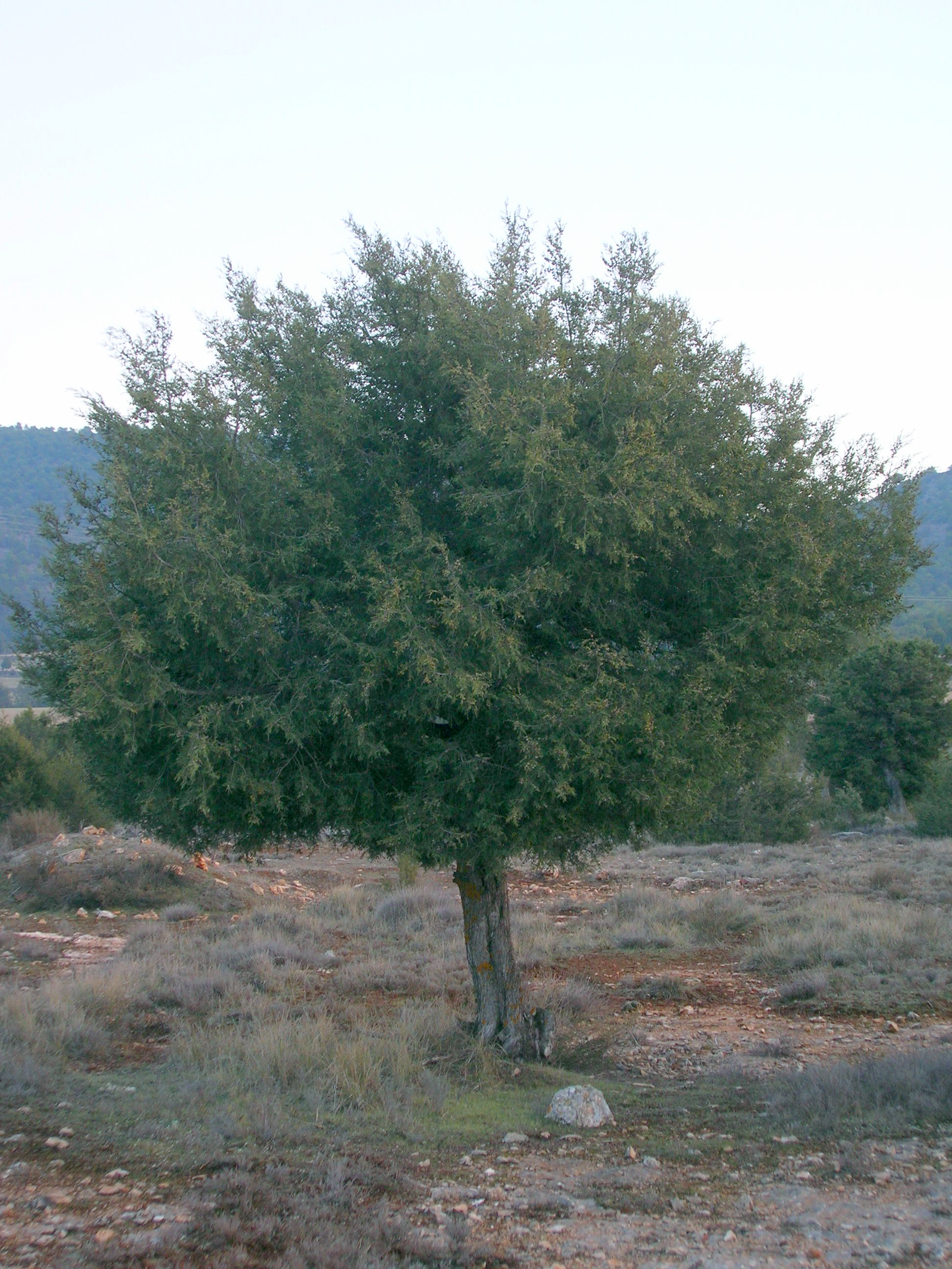 Sabina albar, en las proximidades de El Sabinar, Moratalla, Murcia. Juniperus thurifera L. / Sin.: Juniperus hispanica Lamk.= Juniperus Mill. = Juniperus sabinoides Endl. = Sabina thurifera Ant.